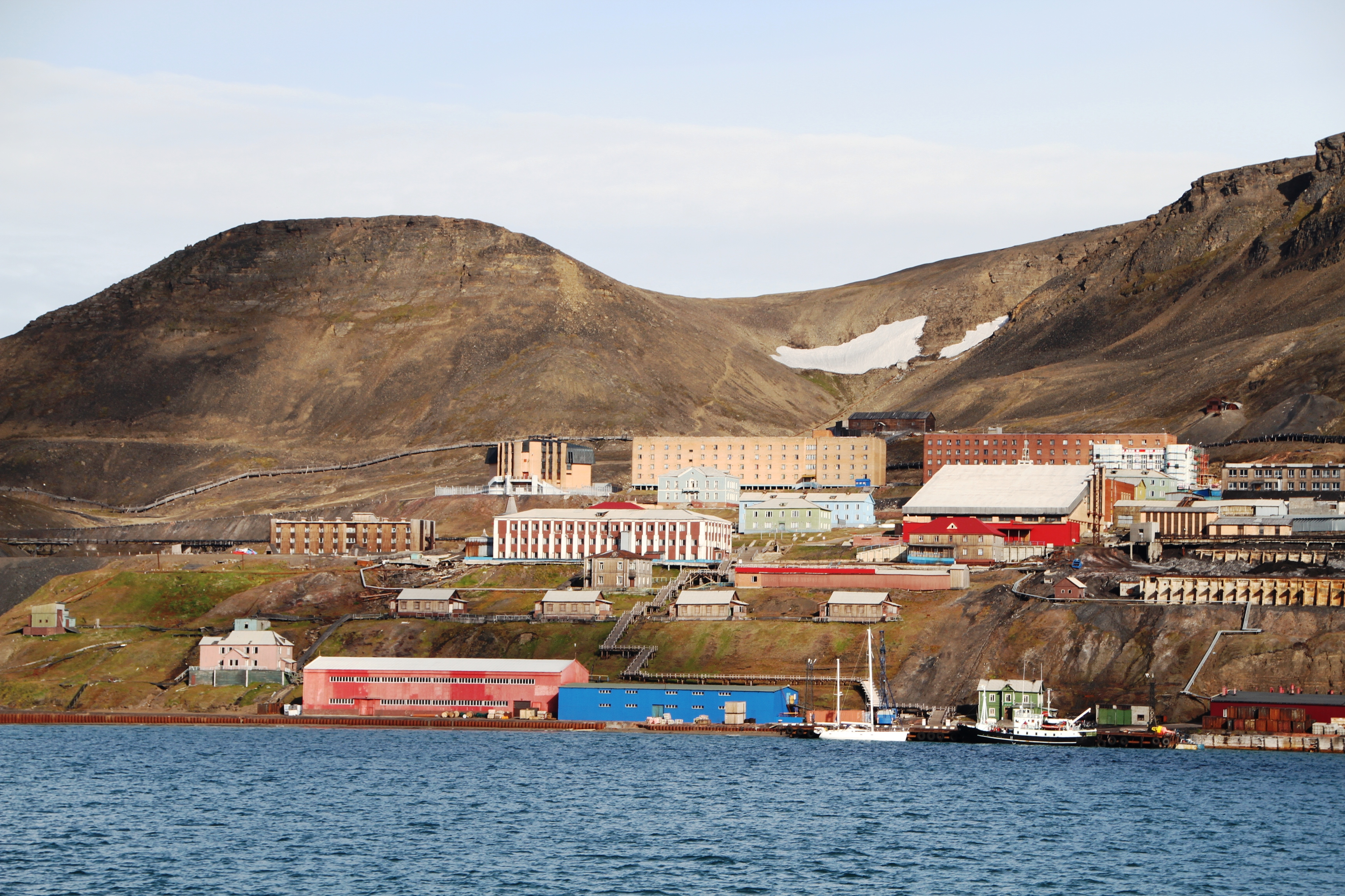 Mining community of Barentsburg, originally from early 1930s. Spitsbergen, Norway. Cultural heritage site No 99920 is a dam that regulates the valley in the center right upper part of the image.